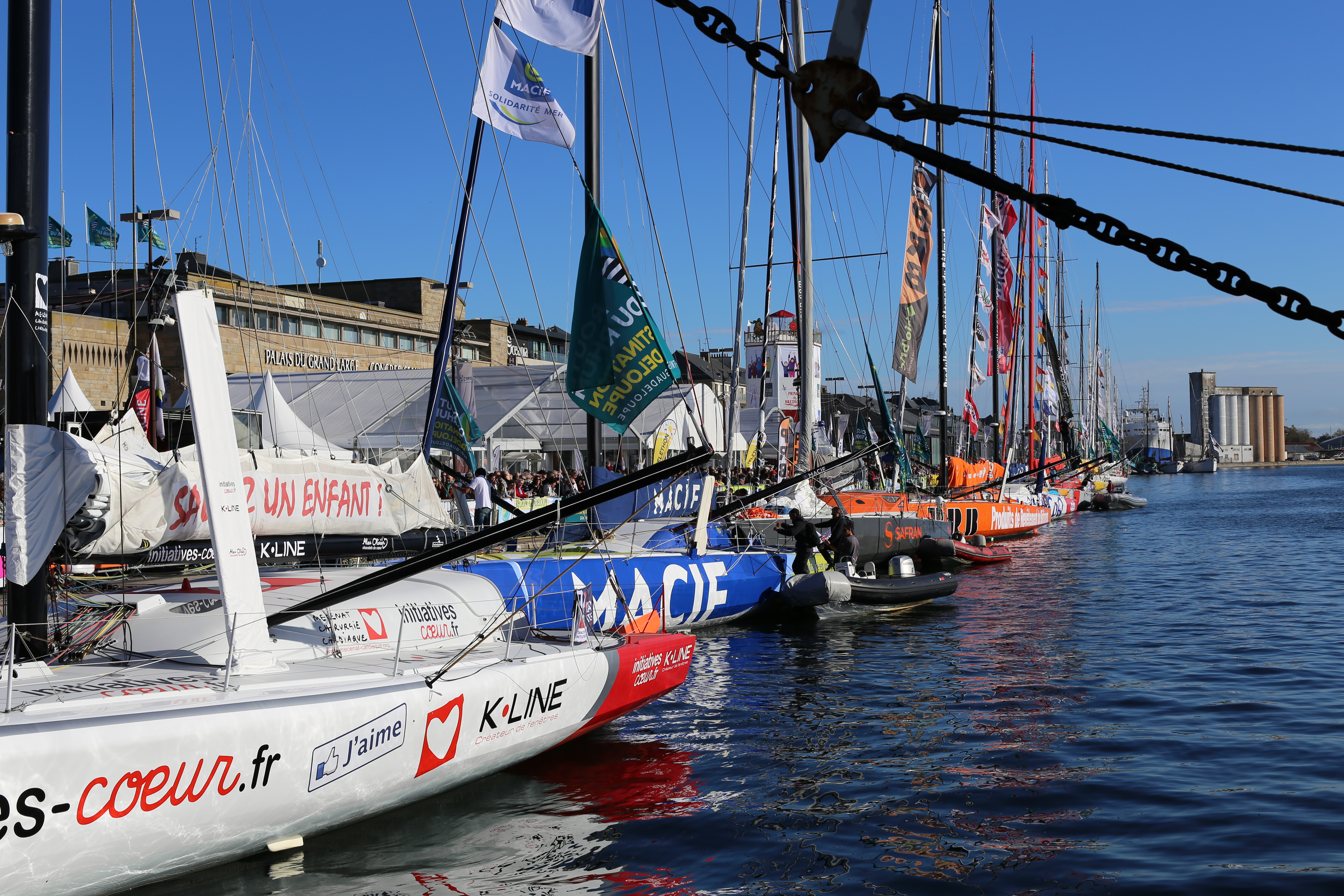 La flotte des IMOCA dans le bassin Duguay-Trouin avant le départ de la Route du Rhum 2014.